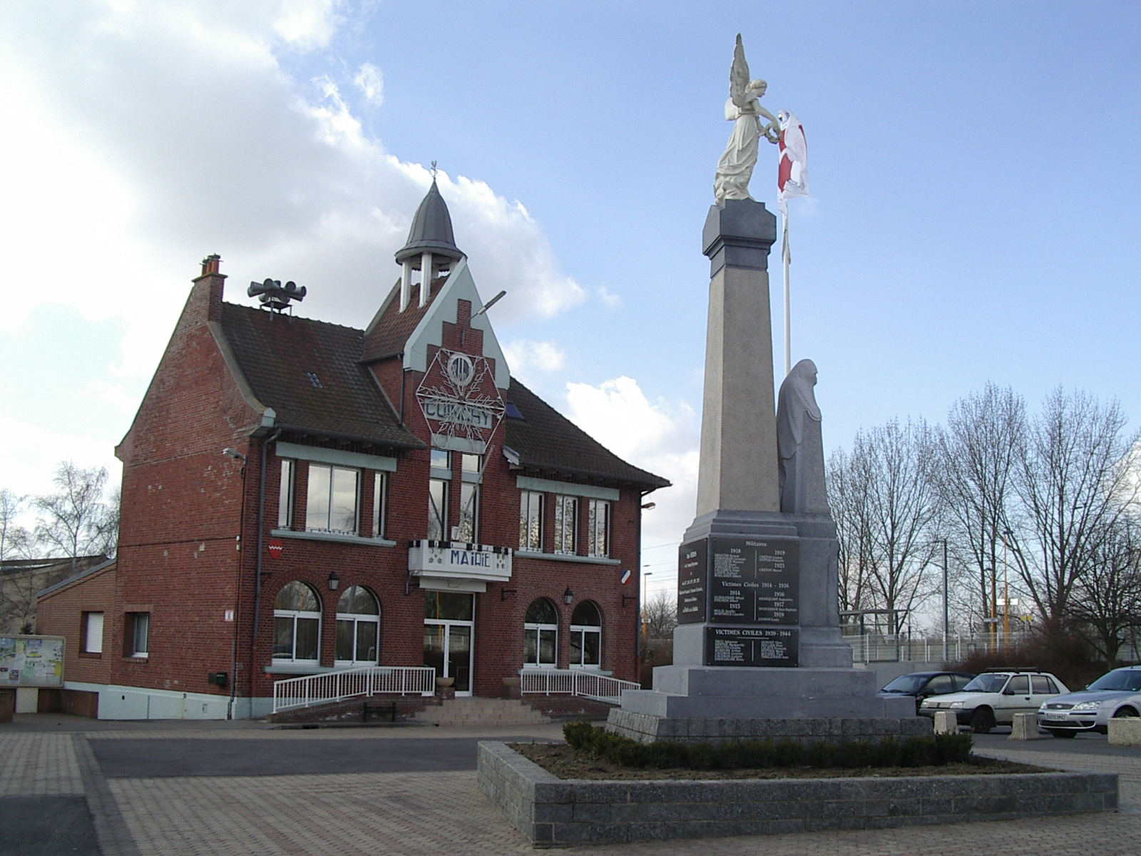 Mairie et monument aux morts de Cuinchy